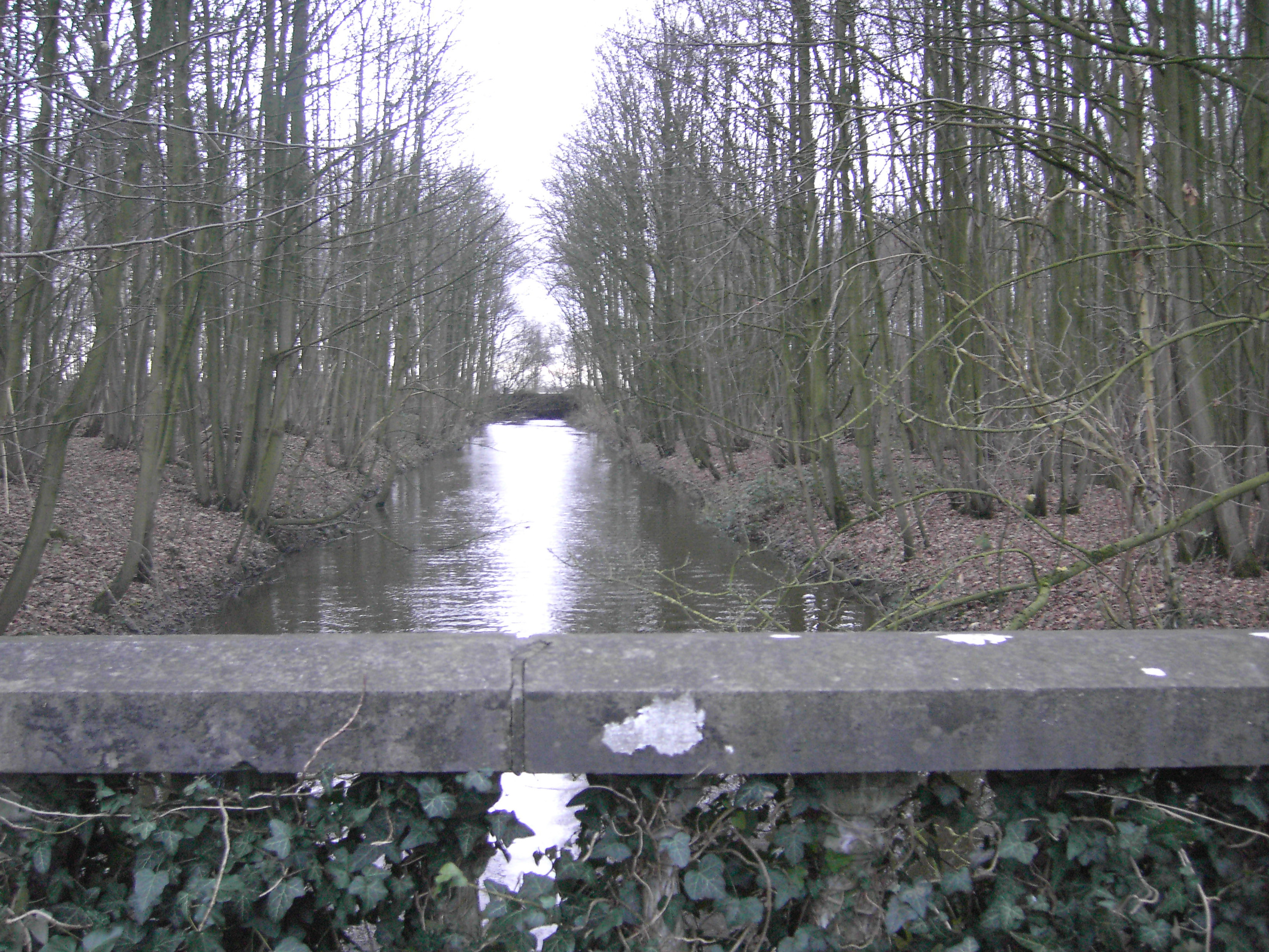 Poeke - Aalter - Belgium